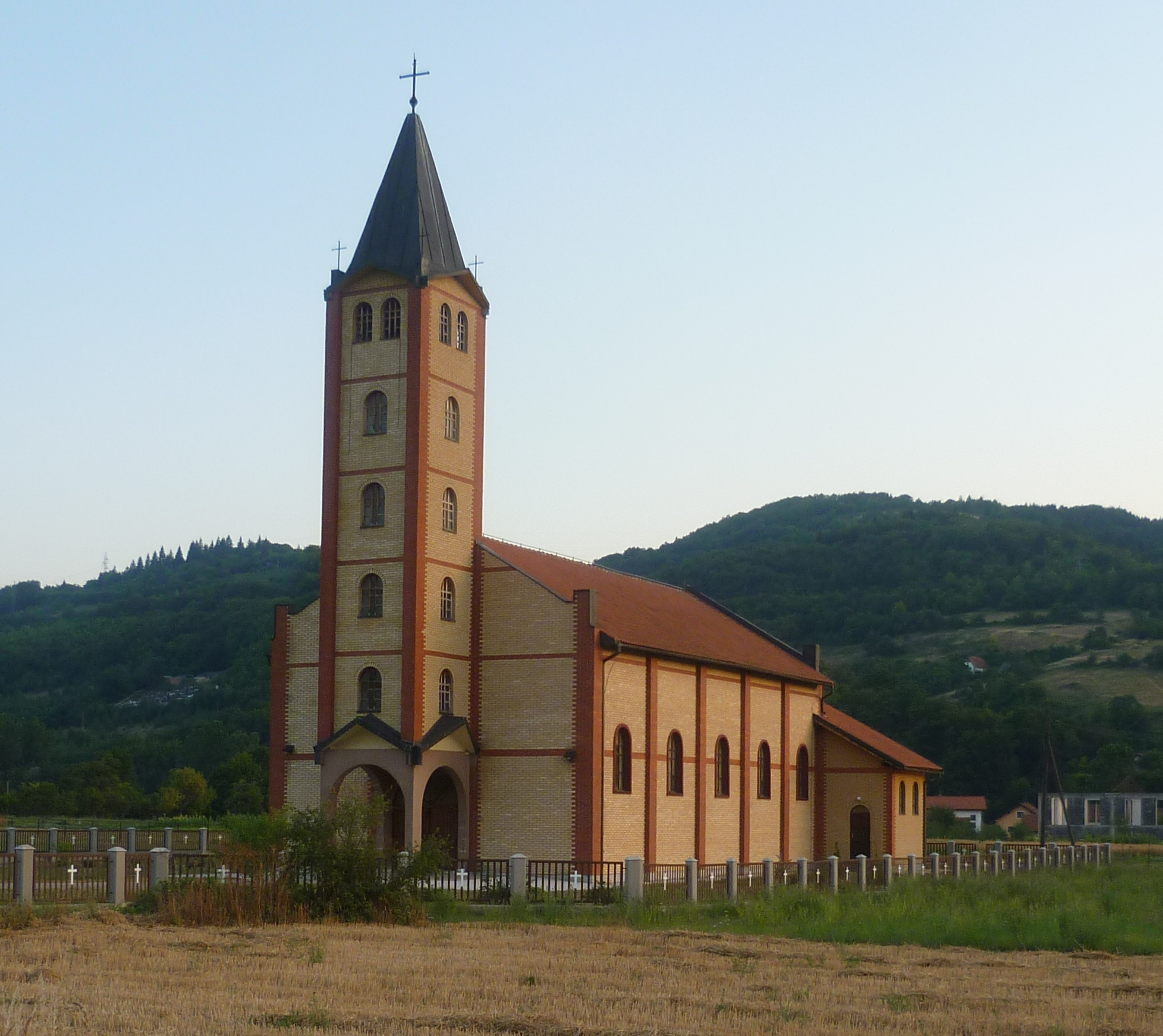 VIlić Polje